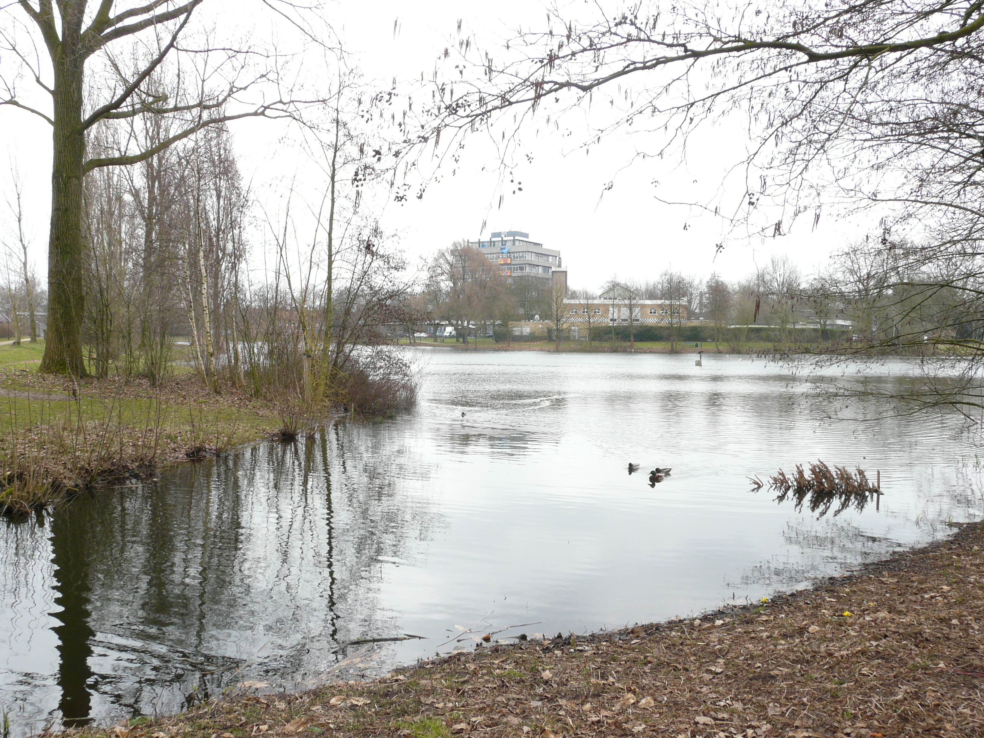 Zicht op een deel van het Liniepark, Breda in Breda. Gelegen in de wijk Doornbos-Linie in het noorden van Breda